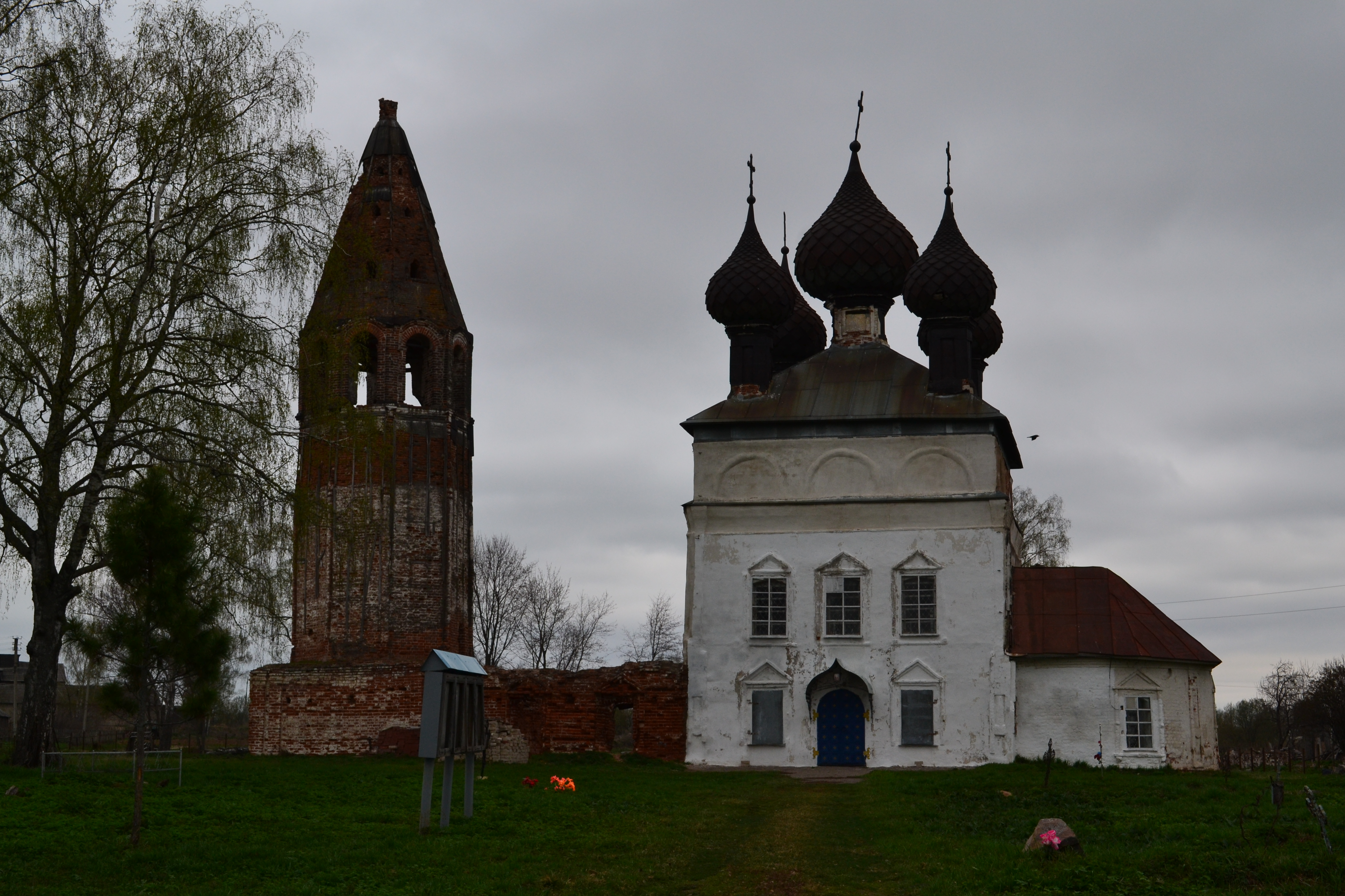 Церковь Введения Николая Чудотворца 18 в.